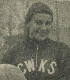 Renata Baudoin de Courteny Mistrzyni Polski w jezdzie szybkiej na lodzie